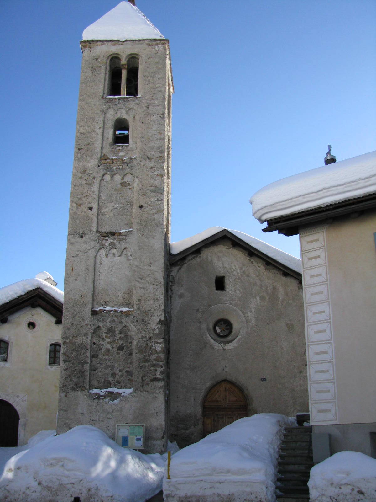 Kirche Crasta